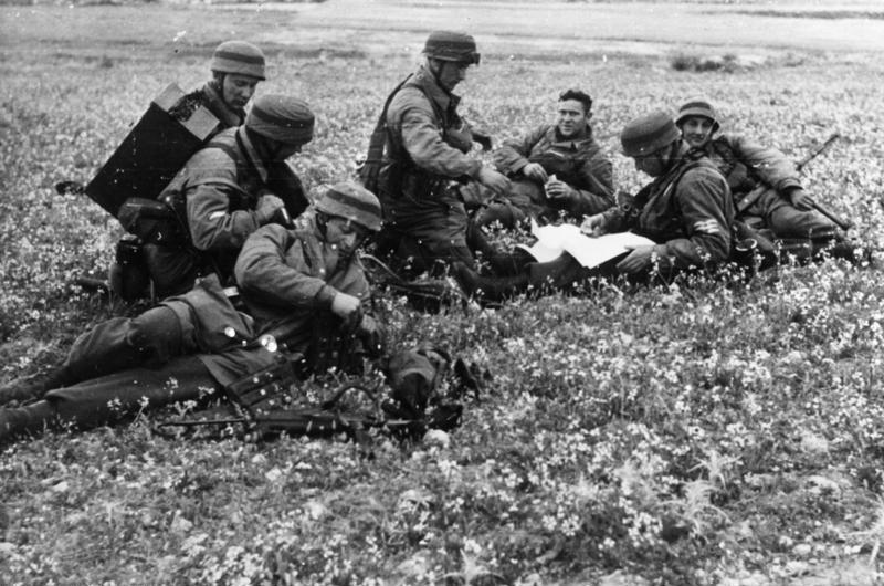 Der Einsatz der Fallschirmjäger in Griechenland. U.B.: Pause beim Kampf um Korinth. 27.05.1941. P.K.Sche.